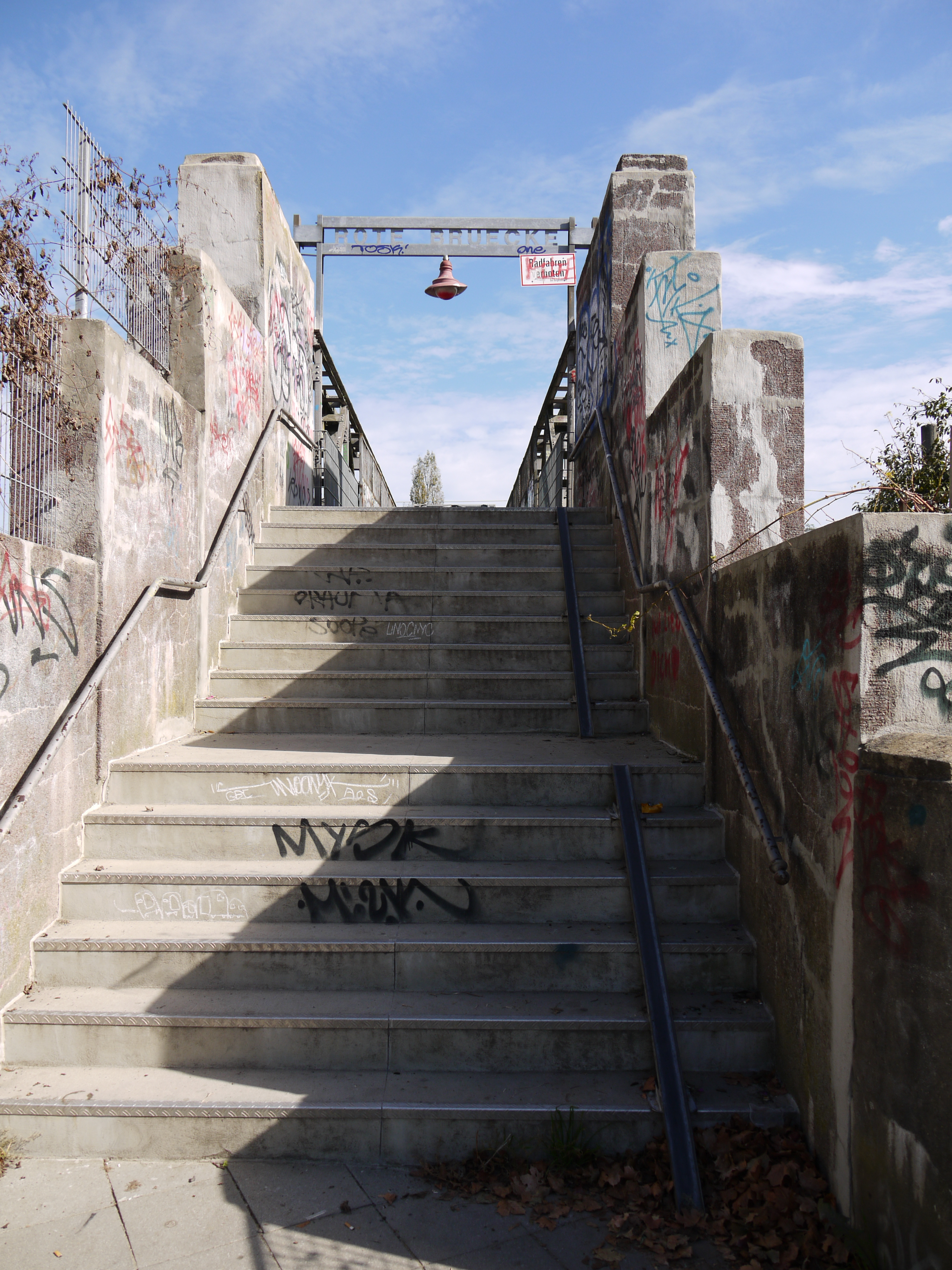 Die sogenannte "Rote Brücke", welche über dem Gelände des S-Bahnhofs Birkenwerder die Erich-Mühsam-Straße mit der Summter Straße verbindet.Nr. 1 der Liste "Baudenkmale in Birkenwerder."Ähnliche Bilder: passendes Video: Play media